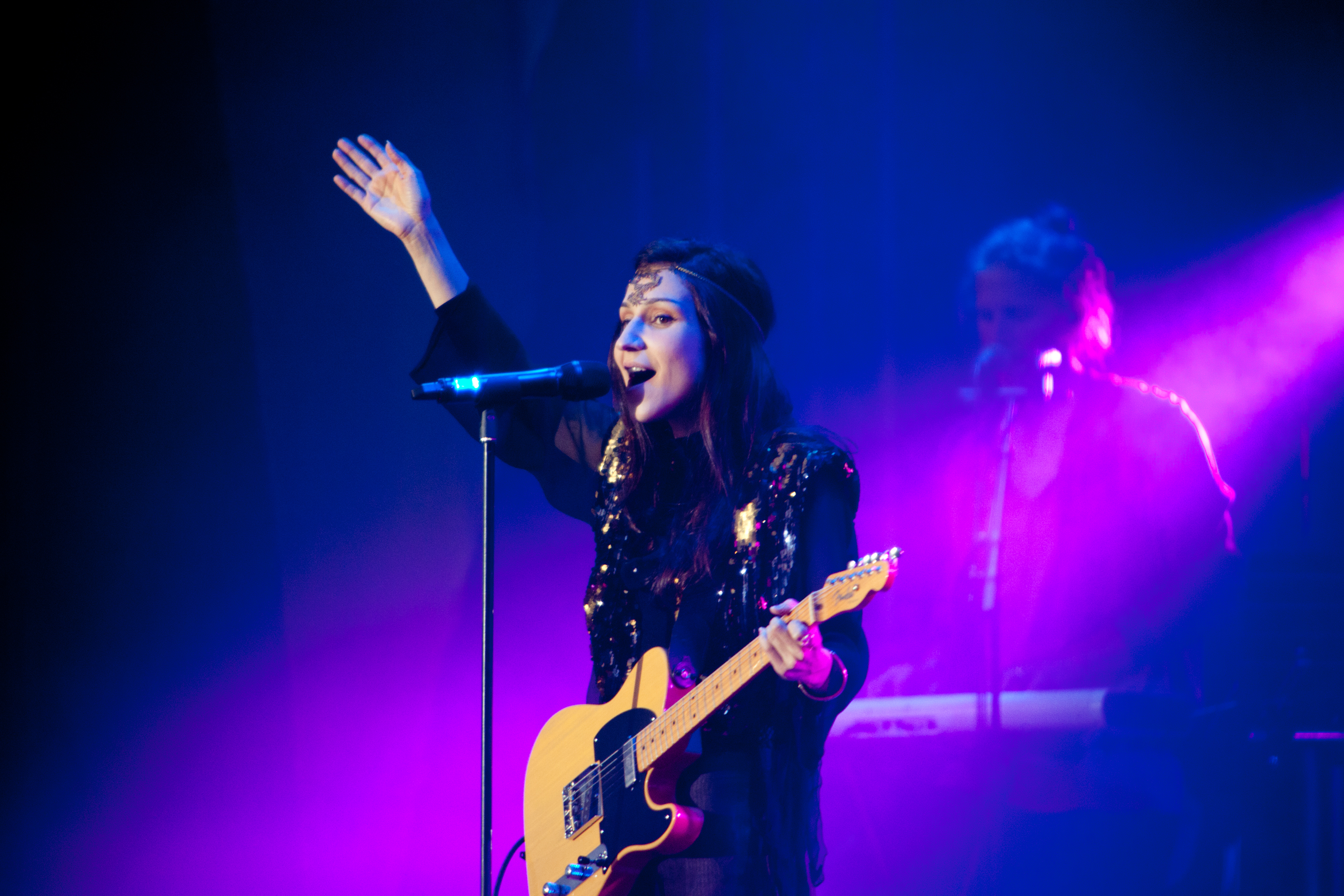 Laleh, Peace & Love-festivalen 29 juni 2012.